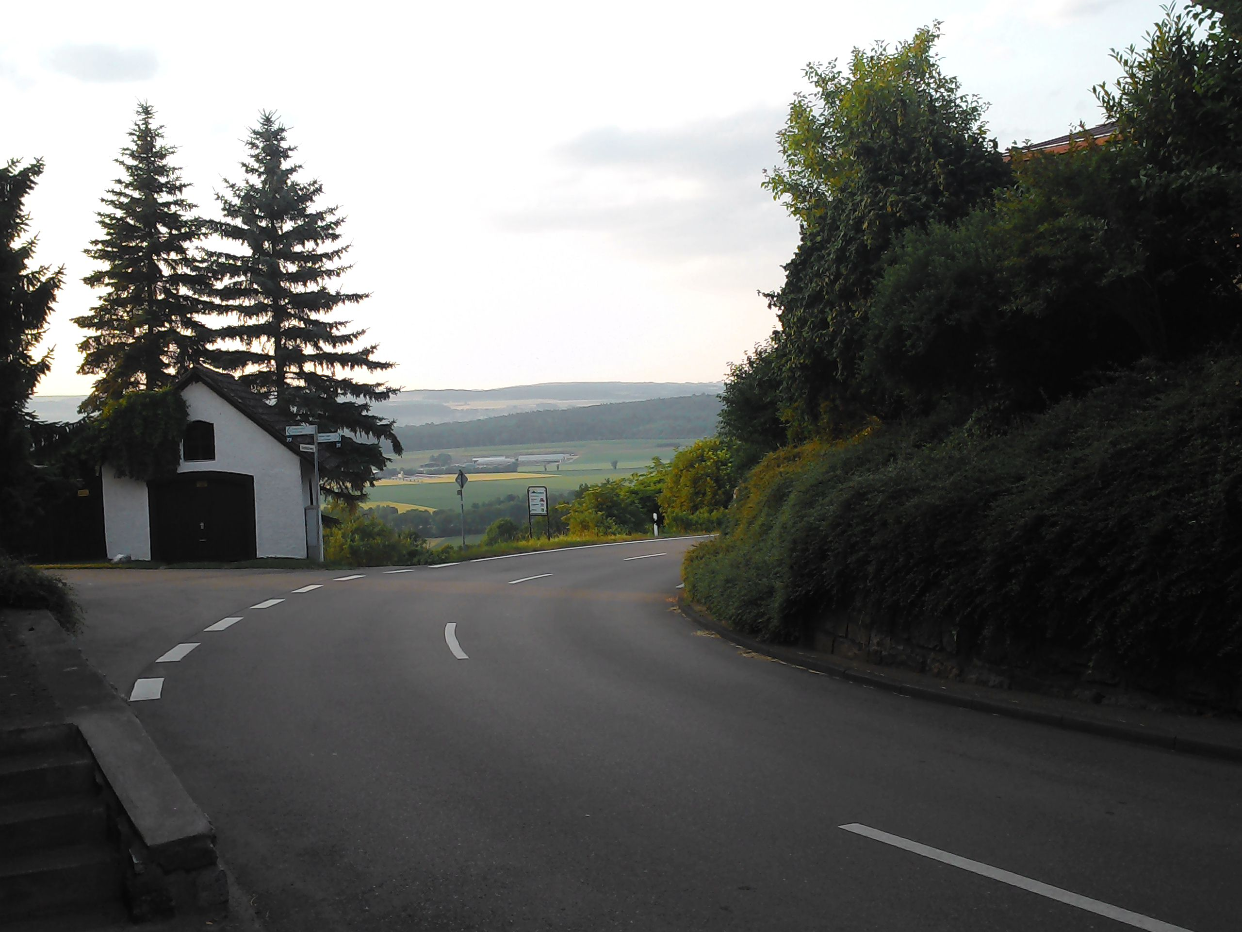 Küssaberg, Gemeinde im Landkreis Waldshut in Baden-Württemberg. Die Passhöhe von Bechtersbohl in den Klettgau (2017).